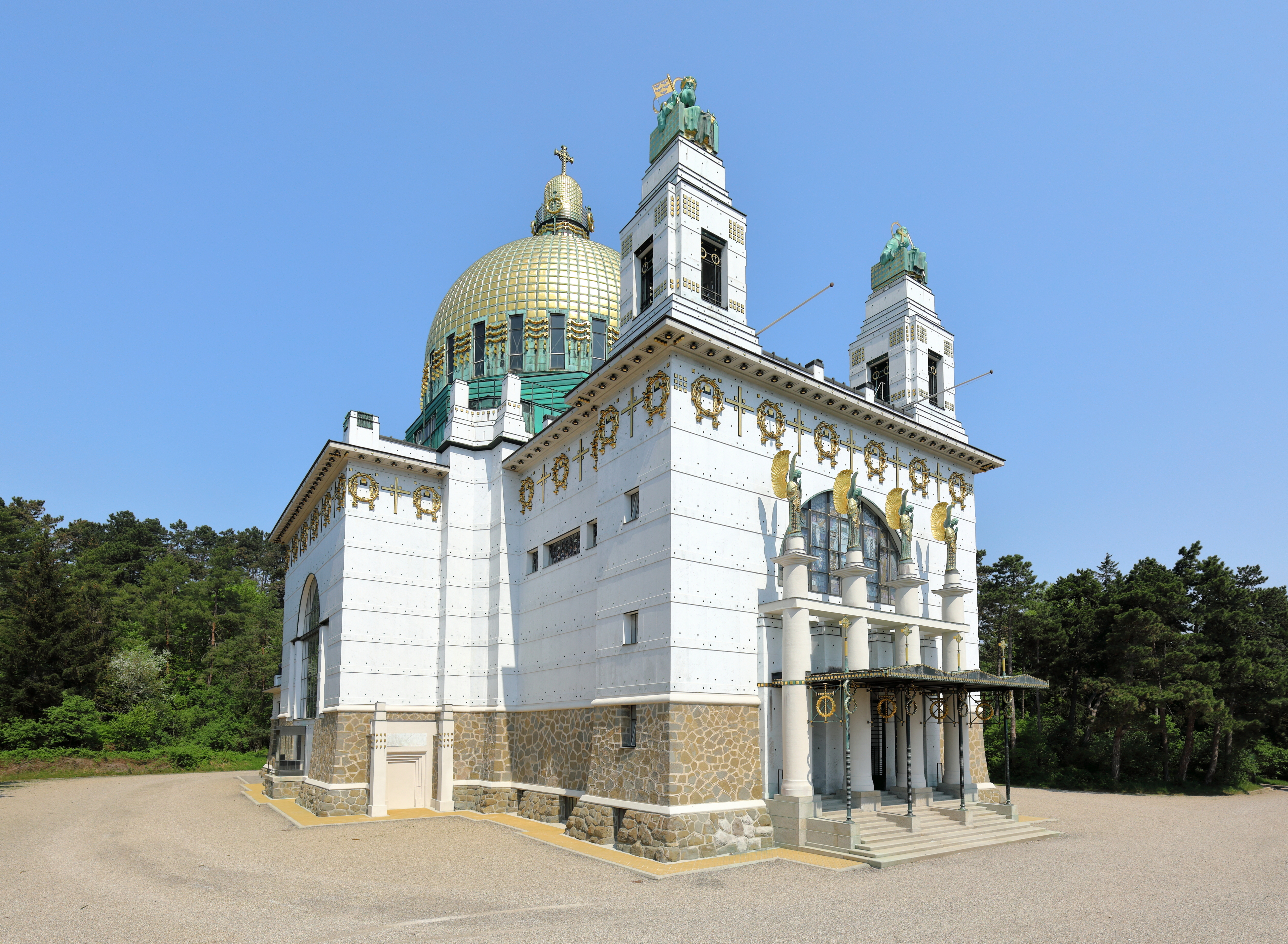 Südwestansicht der Kirche am Steinhof, auch Leopoldskirche bezeichnet, auf dem Gelände des „Sozialmedizinischen Zentrums Baumgartner Höhe“ im 14. Wiener Gemeindebezirk Penzing und das Leopold-Steiner-Denkmal.Die Kirche wurde von 1904 bis 1907 über dem traditionellen Grundriss eines griechischen Kreuzes nach Plänen des Architekten Otto Wagner als Anstaltskirche errichtet. Sie ist der bedeutendste Sakralbau der Wiener Moderne in Wien.